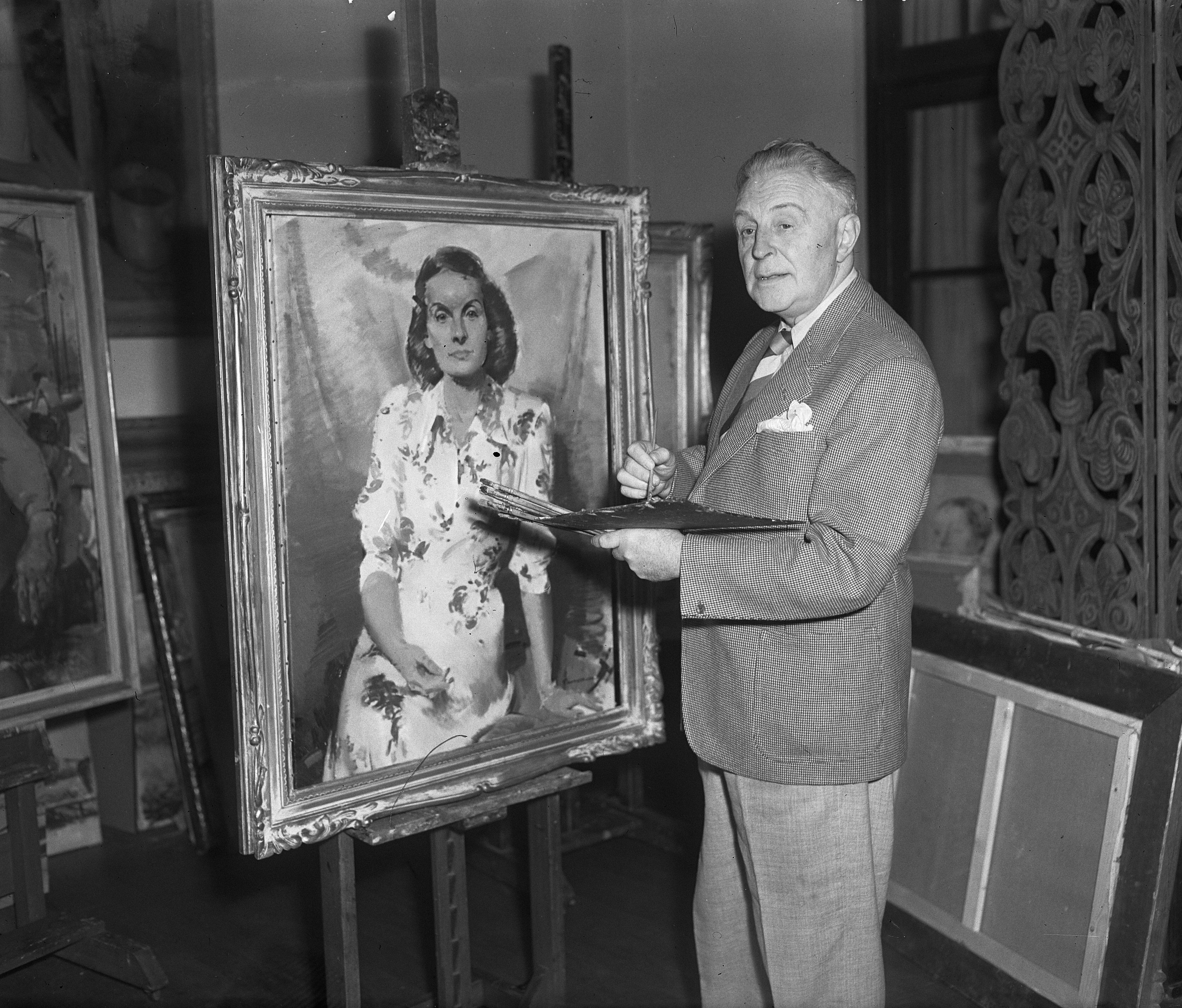 Collectie / Archief : Fotocollectie Anefo Reportage / Serie : [ onbekend ] Beschrijving : Schilder Piet van der Hem Datum : 9 september 1950 Trefwoorden : schilders Fotograaf : Winterbergen, […] / Anefo Auteursrechthebbende : Nationaal Archief Materiaalsoort : Glasnegatief Nummer archiefinventaris : bekijk toegang 2.24.01.09 Bestanddeelnummer : 904-1754